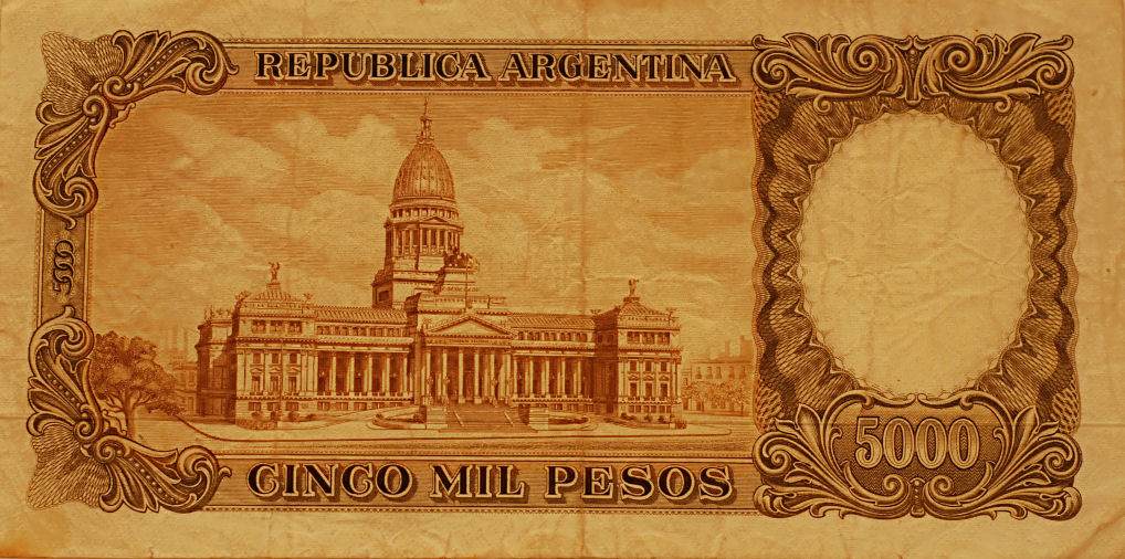 Billete de 5.000 Pesos Moneda Nacional, de Argentina.